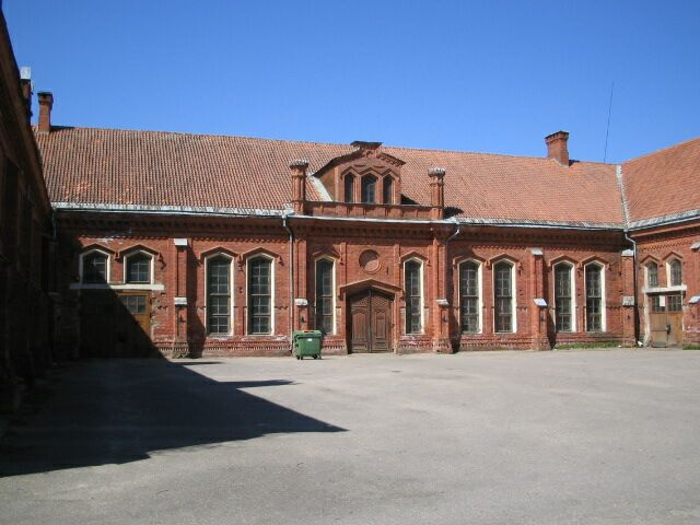 Dvaro arklidės ir ratinė.